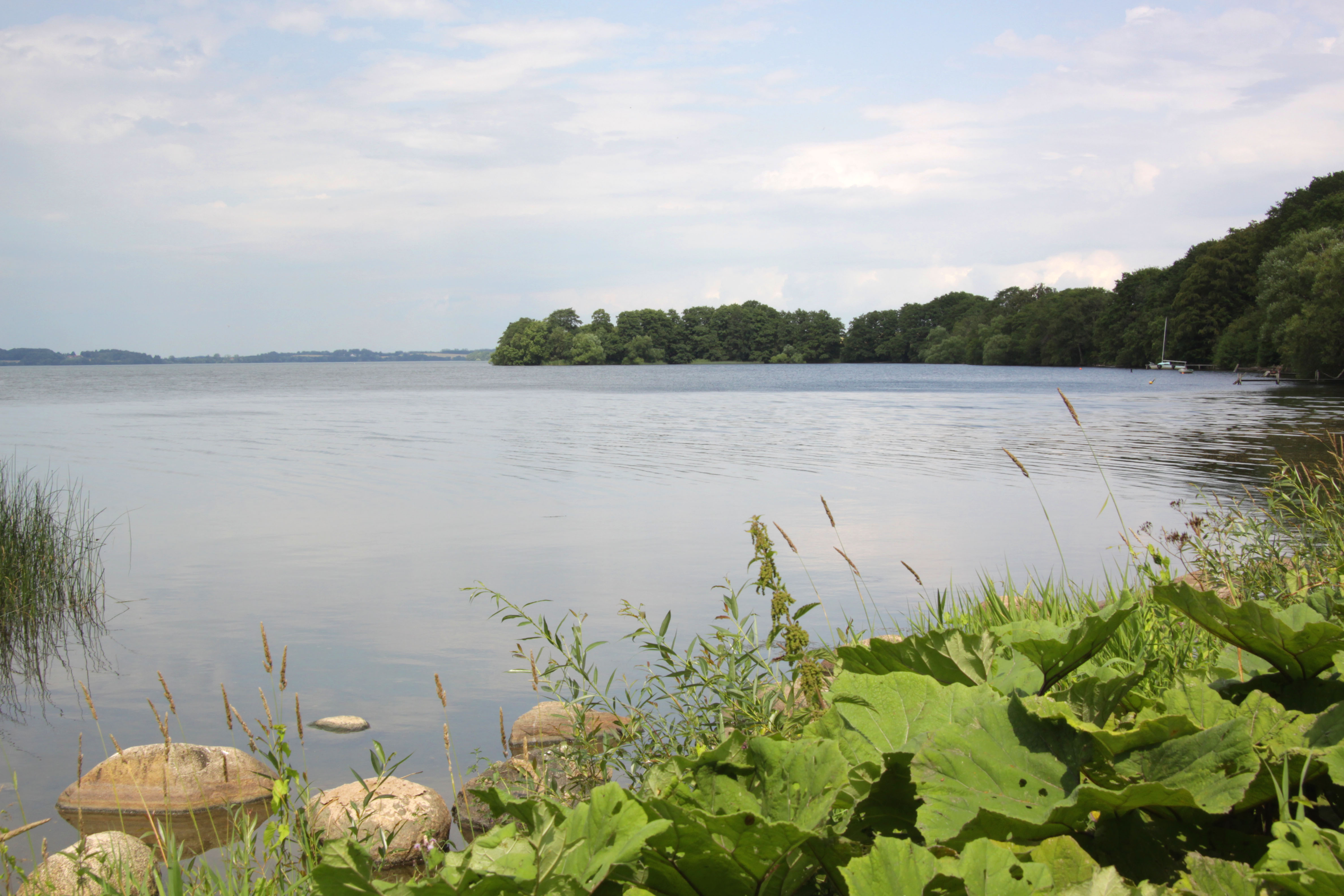 Fredensborg. Esrum Sø.